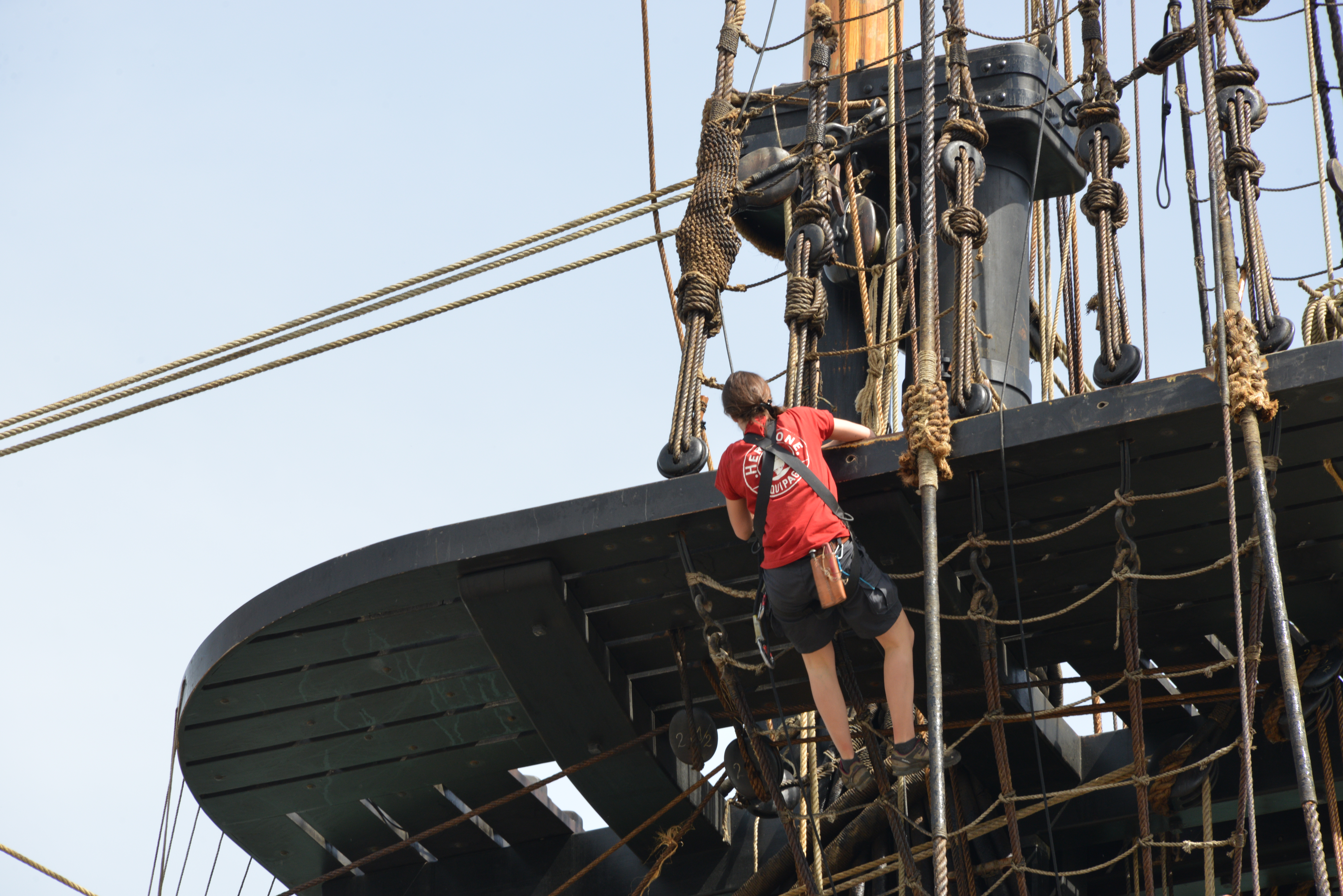 Travaux de matelotage (sur pont, mature, voilure et cordages) sur L'Hermione. La Rochelle, Charente-Maritime, France.